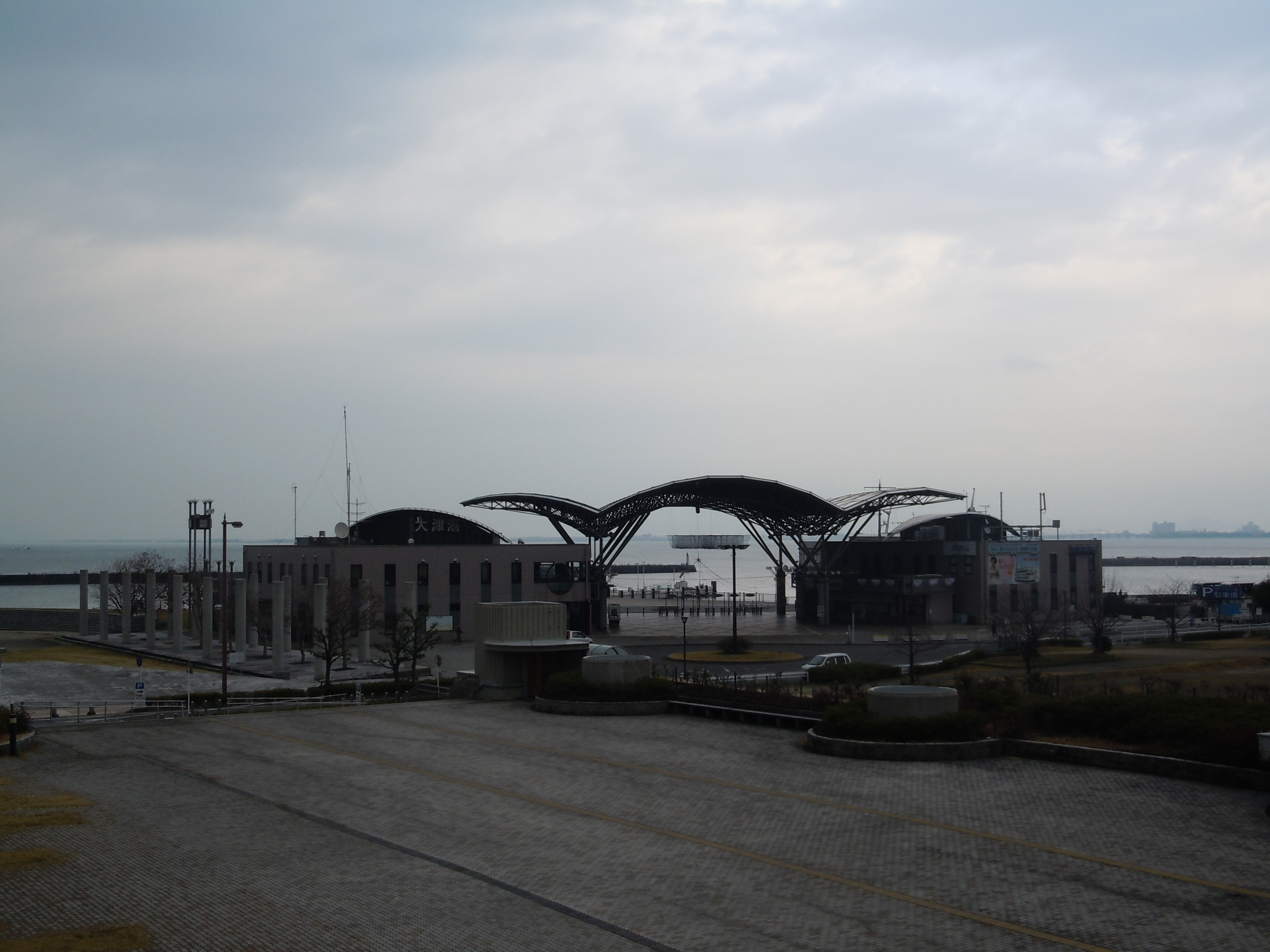 滋賀県大津市にある大津港。